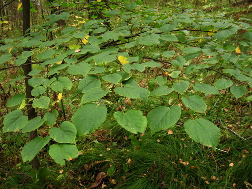 Tilia nasczokinii: ветвь с листьями. Окр. Красноярска, руч. Каштак близ границы заповедника "Столбы". 08-09-2007. Автор: Николай Степанов.